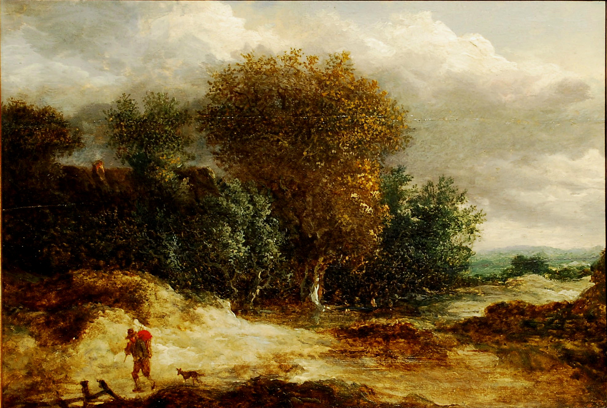 Landschaft mit aufziehendem Gewitter